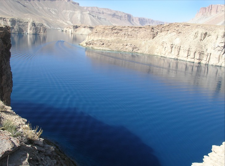 Band-e Amir lakes in Bamyan. (Afghanistan)